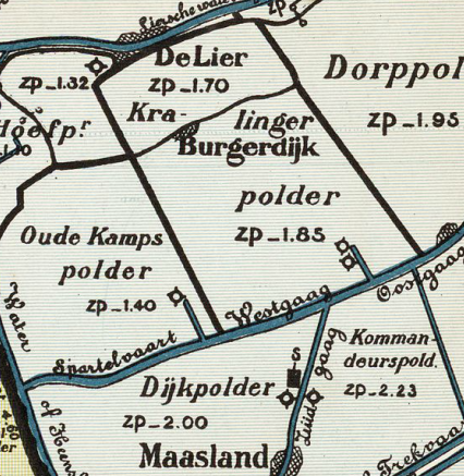 Kralingerpolder